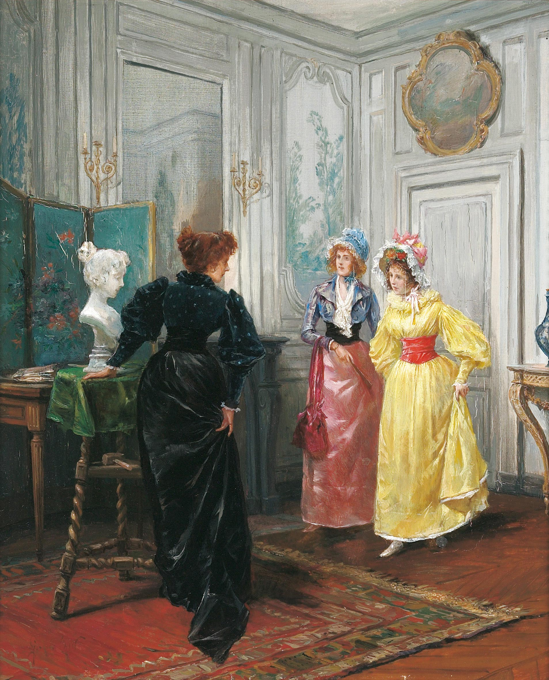 Die Büste, signiert Georges Cain, Öl auf Leinwand, 46 x 38 cm